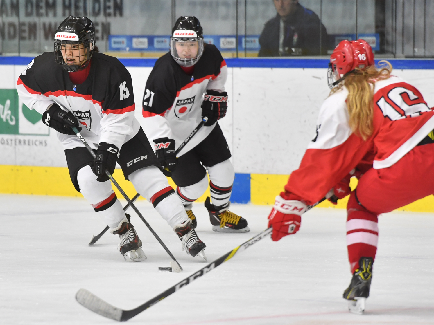 IIHF Eishockey Damen Weltmeisterschaft Division IA am 16. April 2017 in Graz.Bild zeigt Rui UKITA (JPN).